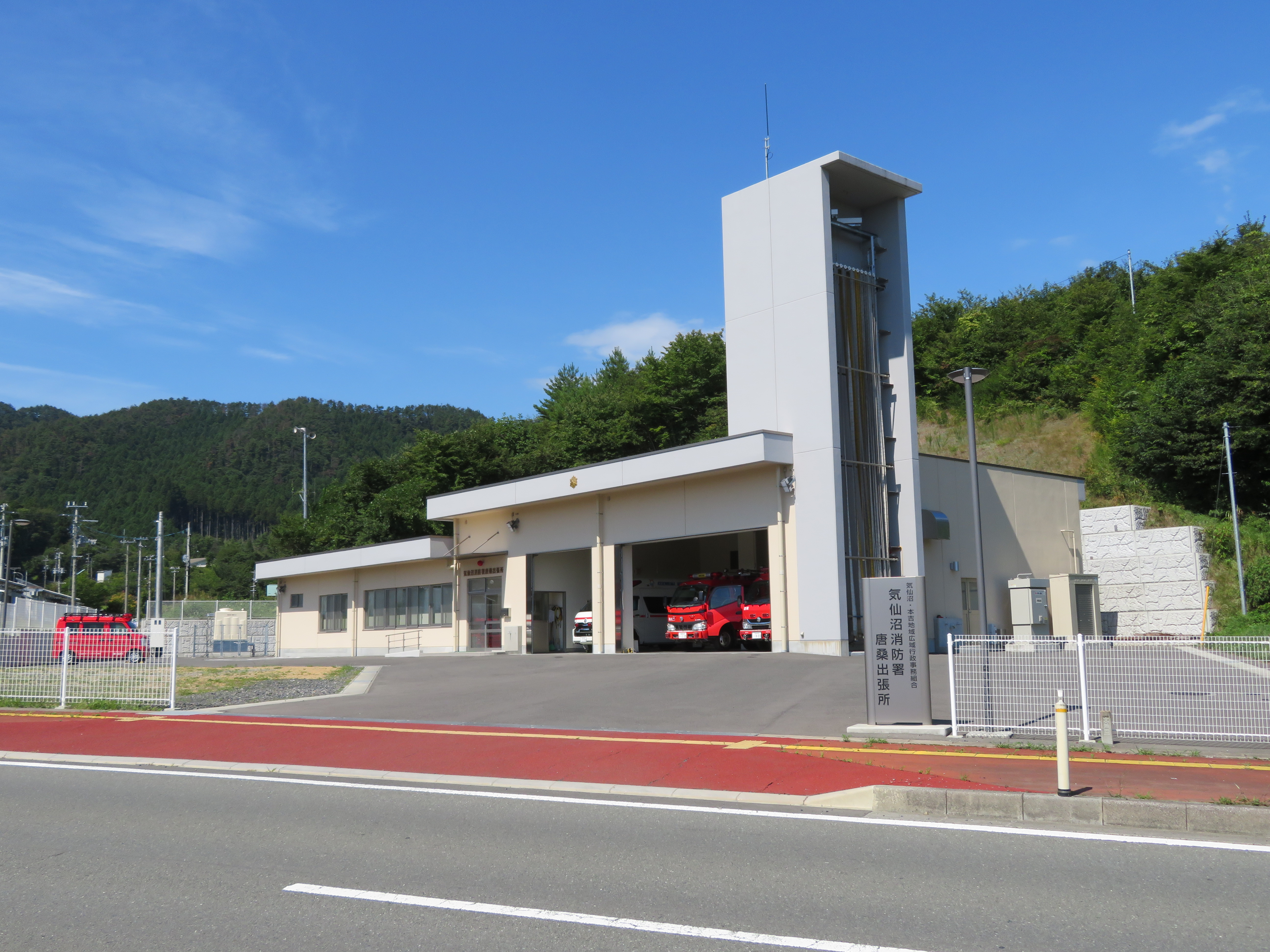 気仙沼消防署唐桑出張所庁舎 Canon PowerShot SX720 HS